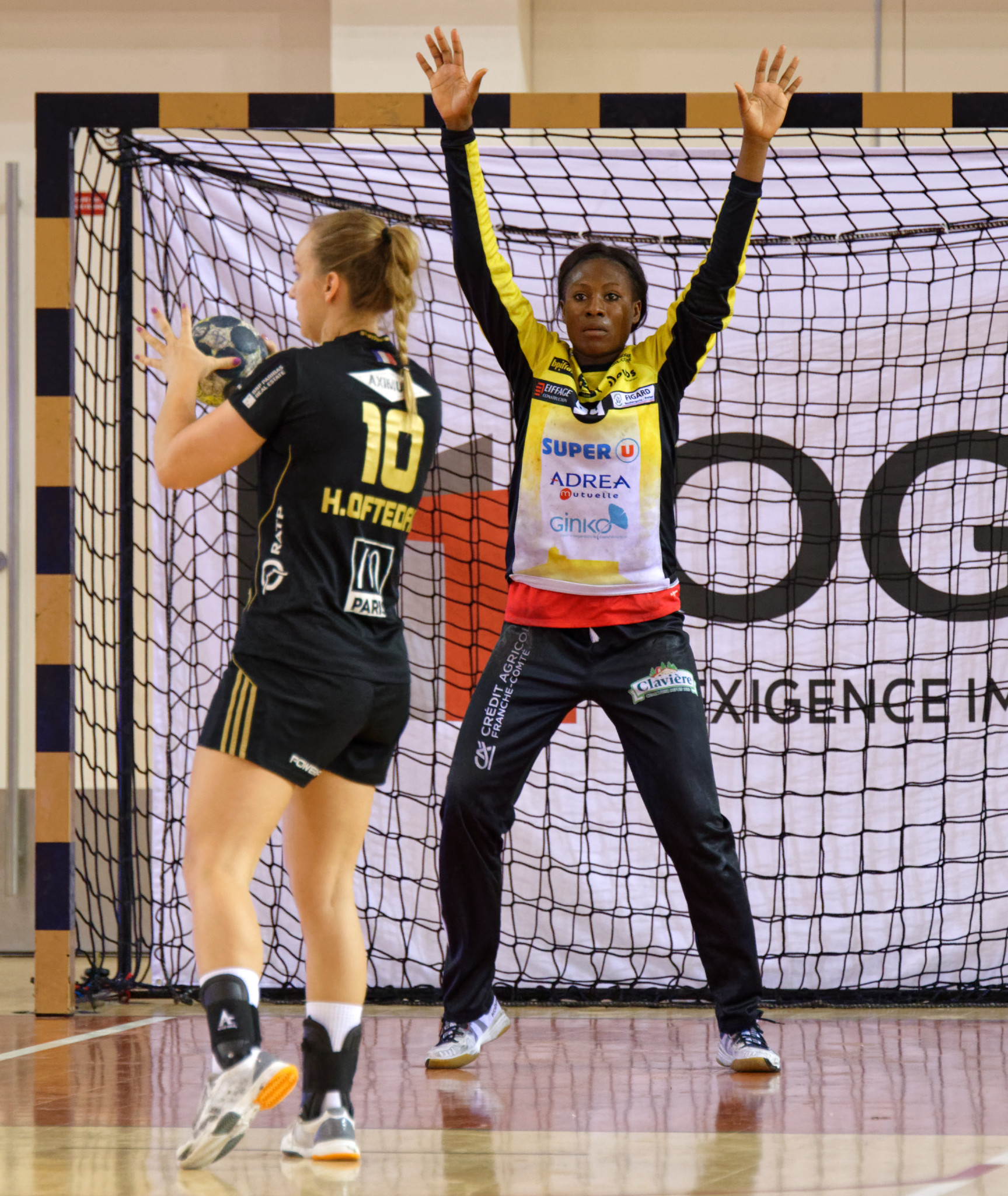 Rencontre retour de quart de finale de playoffs (place 3 et 4) entre Issy Paris Hand et ES Besançon. A Issy Les Moulineaux, le 3 juin 2017